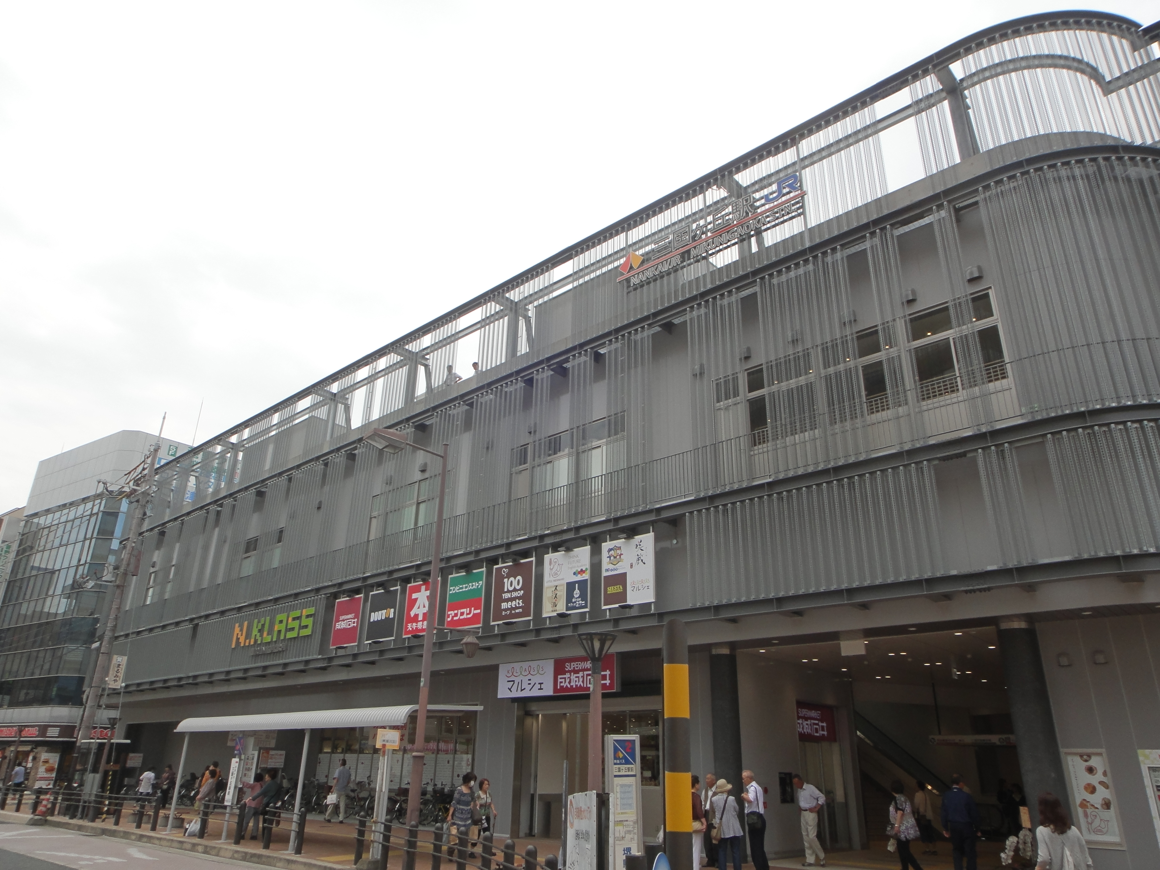 三国ヶ丘駅東口 投稿者により撮影